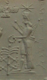 La déesse Ishtar armée, sous l'étoile symbolisant Vénus, détail de l'impression d'un sceau-cylindre d'époque néo-assyrienne. Cabinet des Médailles.